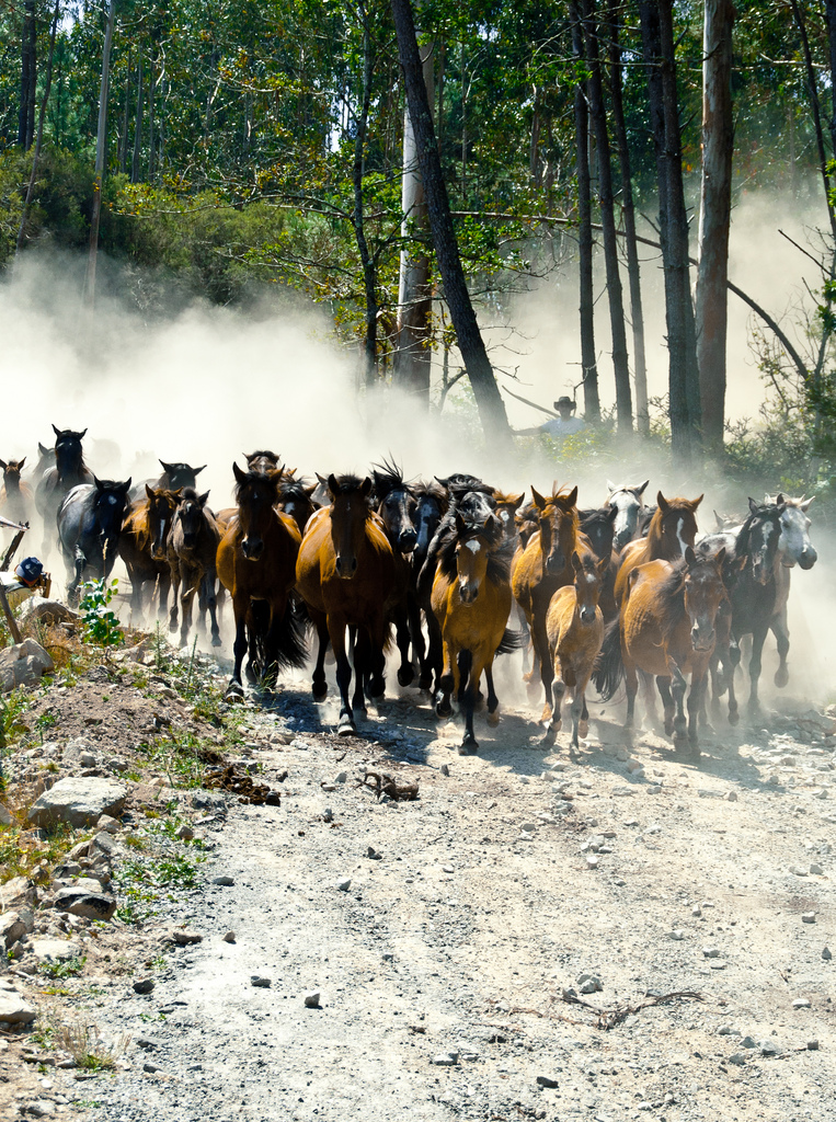 IX Rapa das Bestas do Xiabre en Catoira